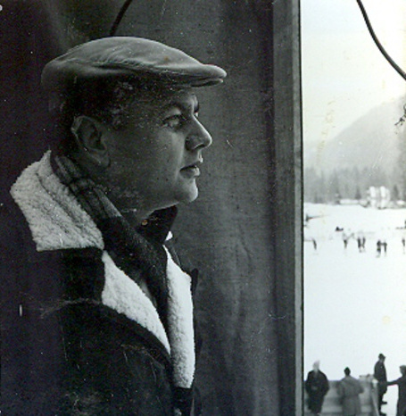 Beno Hvala